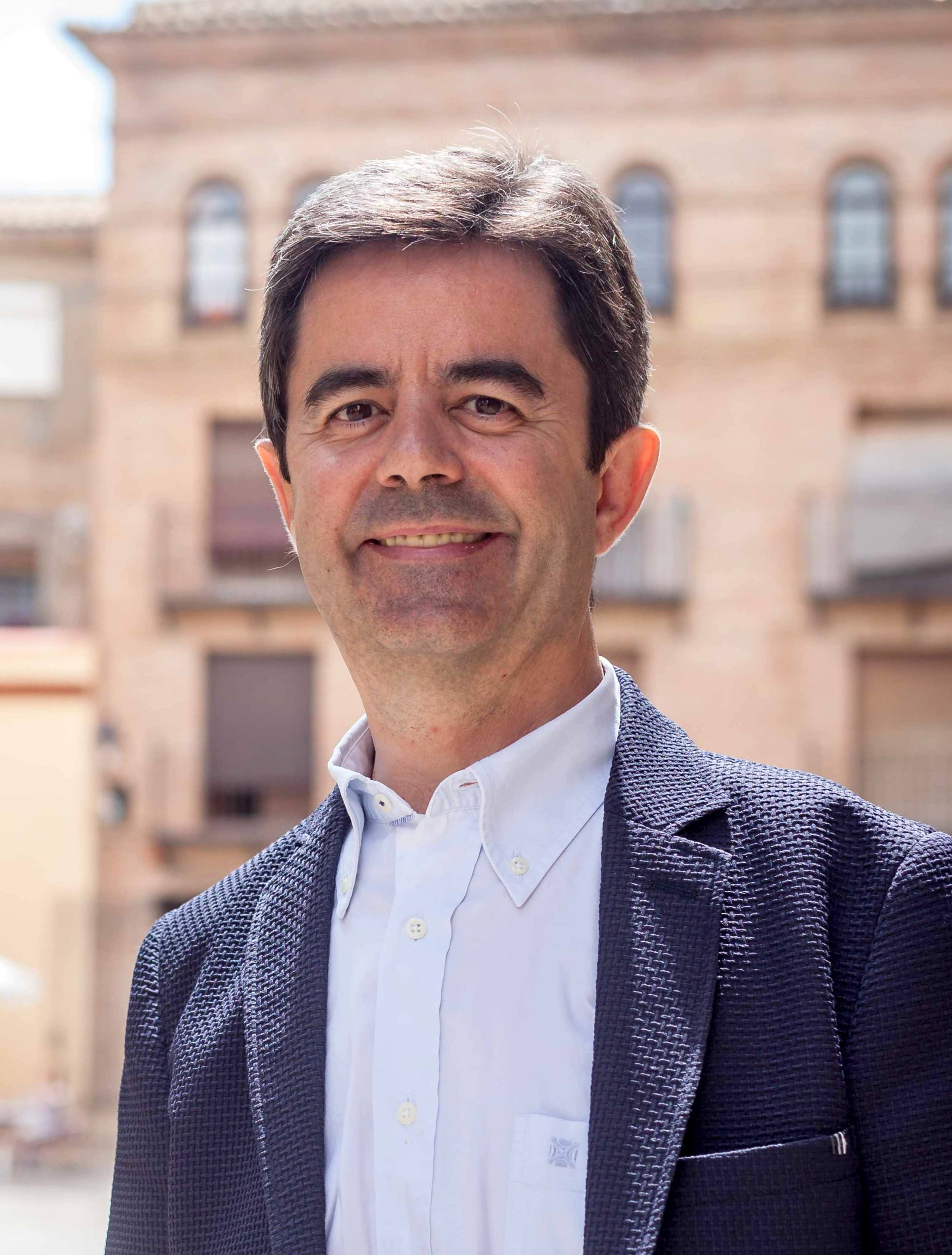 Luis Felipe Serrate, alcalde de Huesca